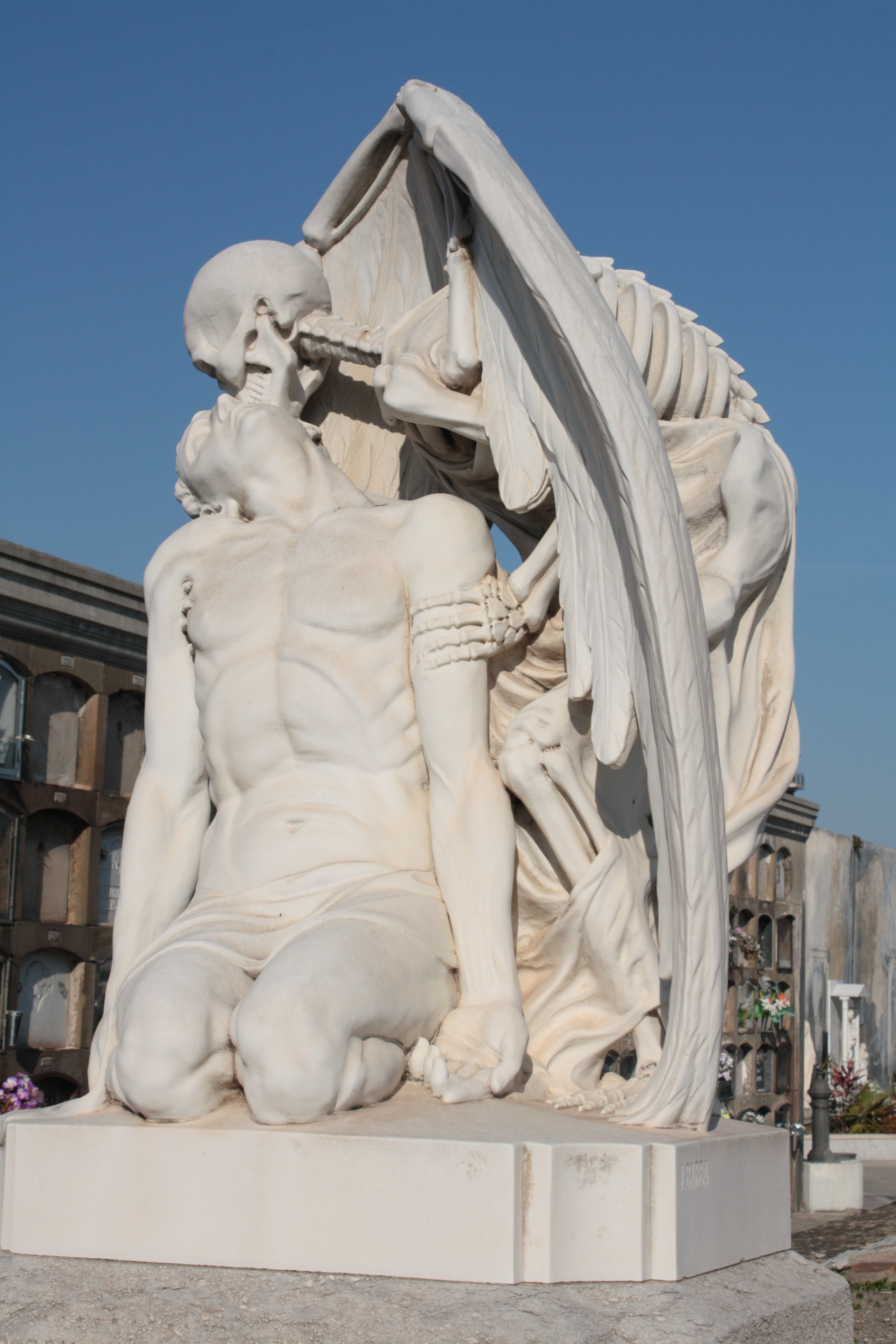 Sepultura disenyada per Jaume Barba, cementiri del Poblenou.